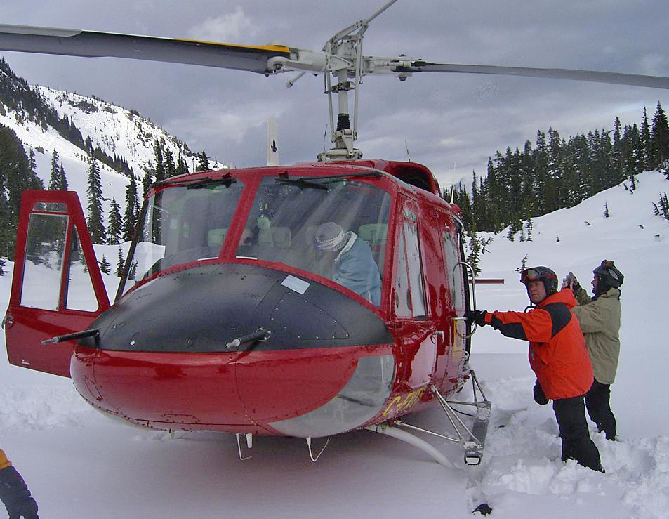 Bild: Heliskiing/Heliboarding; Urheber: Benutzer:Scarver, owner of planetsnowboard.de